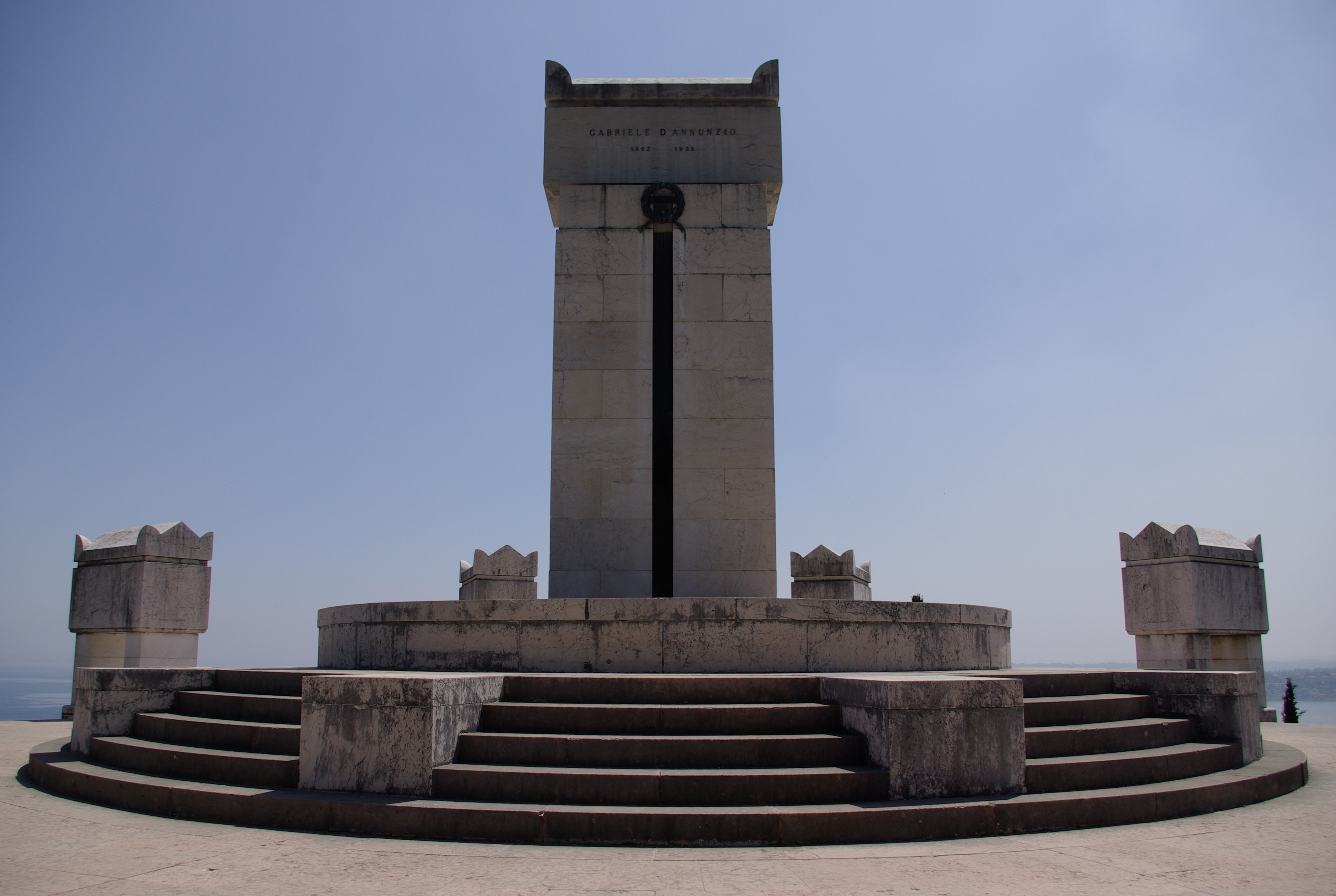 Mausoleum von Gabriele D’Annunzio im Vittoriale degli italiani in Gardone Riviera